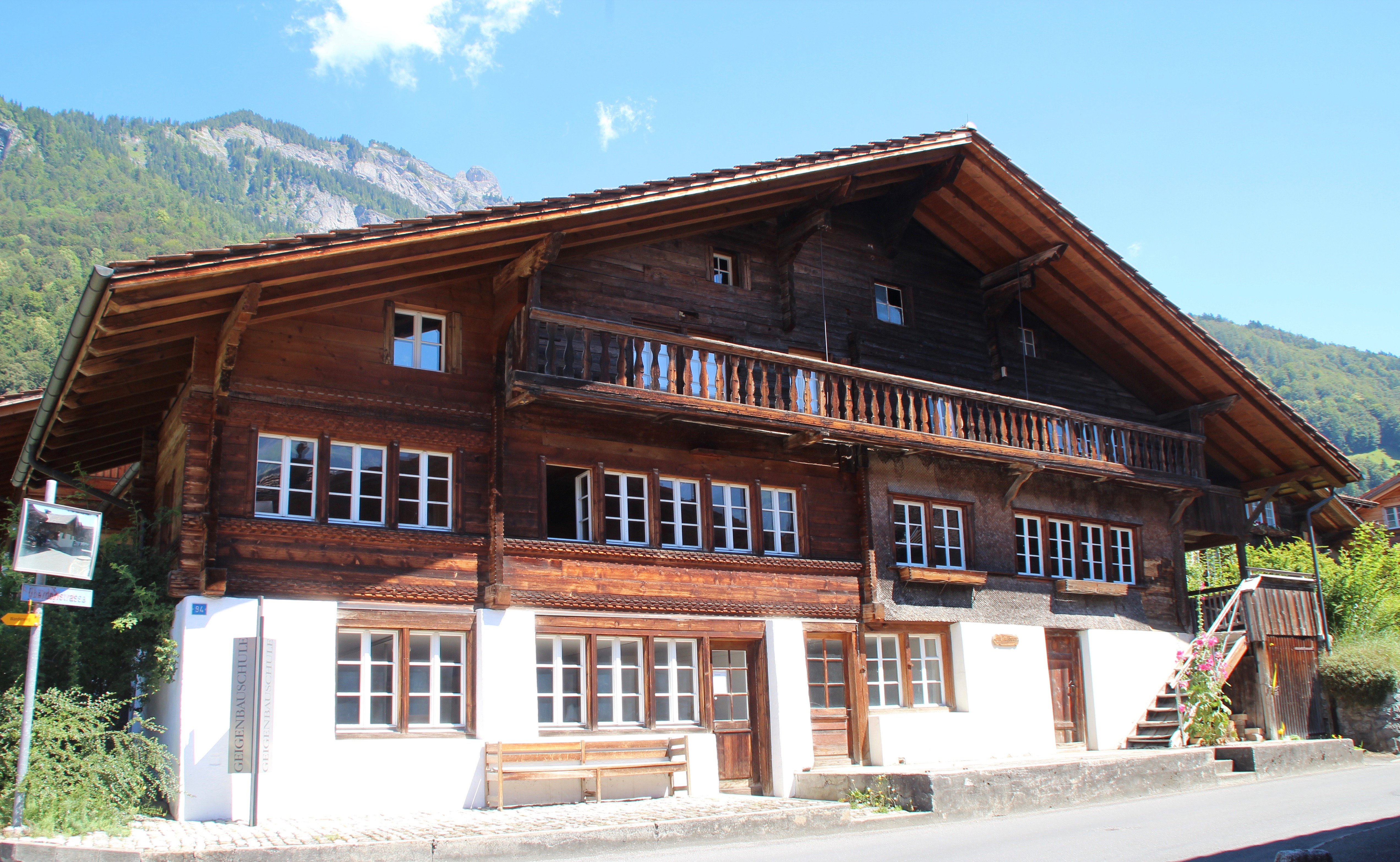 Geigenbauschule Brienz